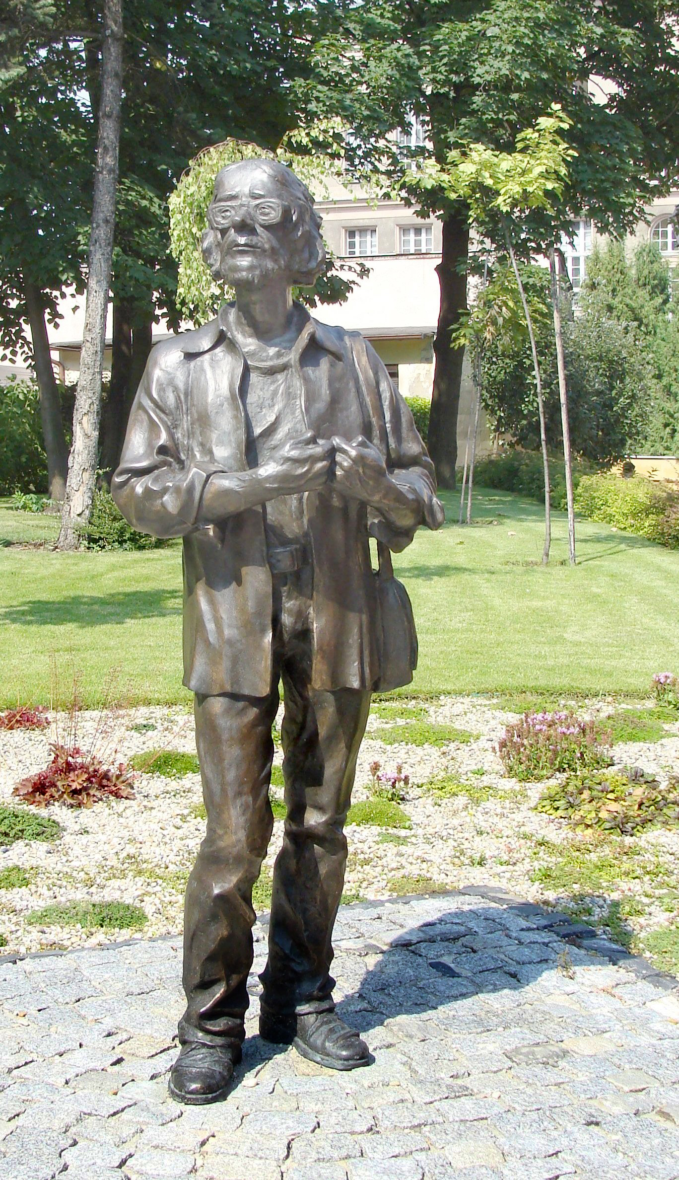 Pomnik Jerzego Grotowskiego obok Rektoratu UO w Opolu. Autor projektu: prof. Marian Molenda. Odlew: Wiktor Chalupczok.